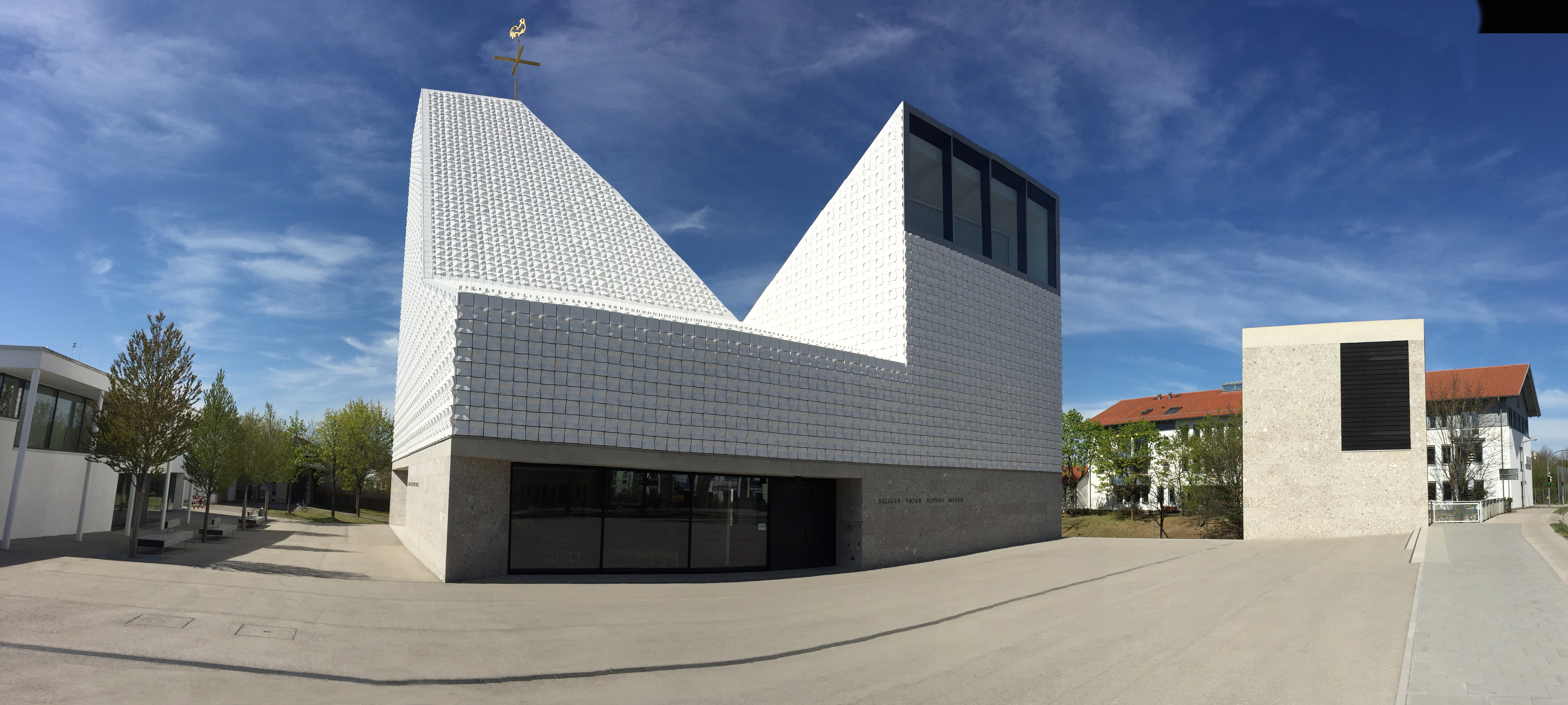 Kirche Poing Seliger Pater Rupert Mayer Panorama von aussen